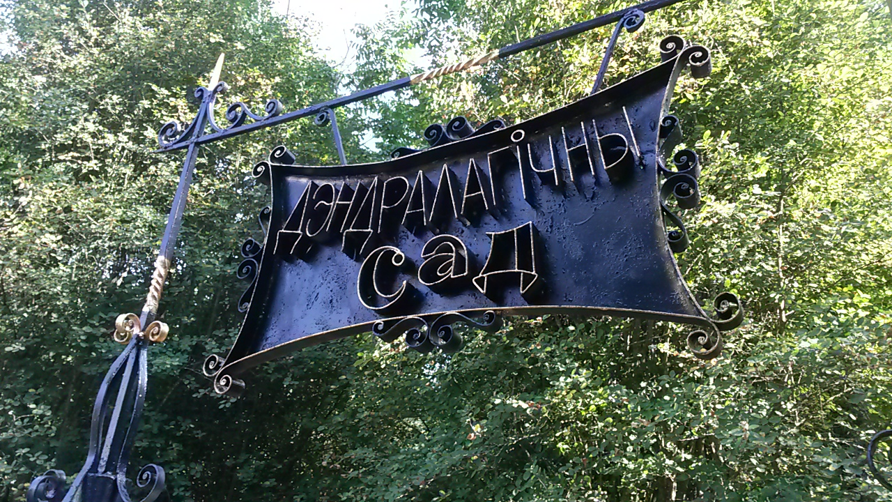 Уваход у Глыбоцкі дэндрасад